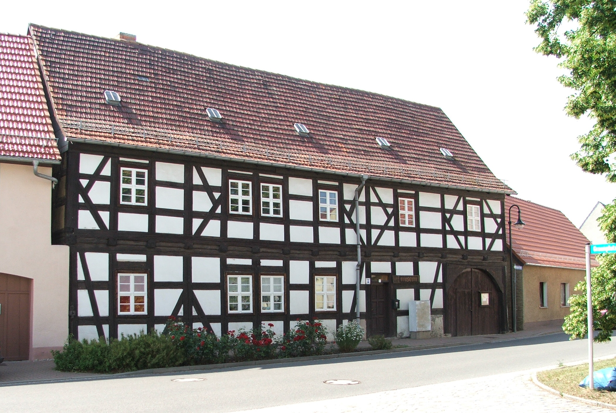 Museum in Wahrenbrück